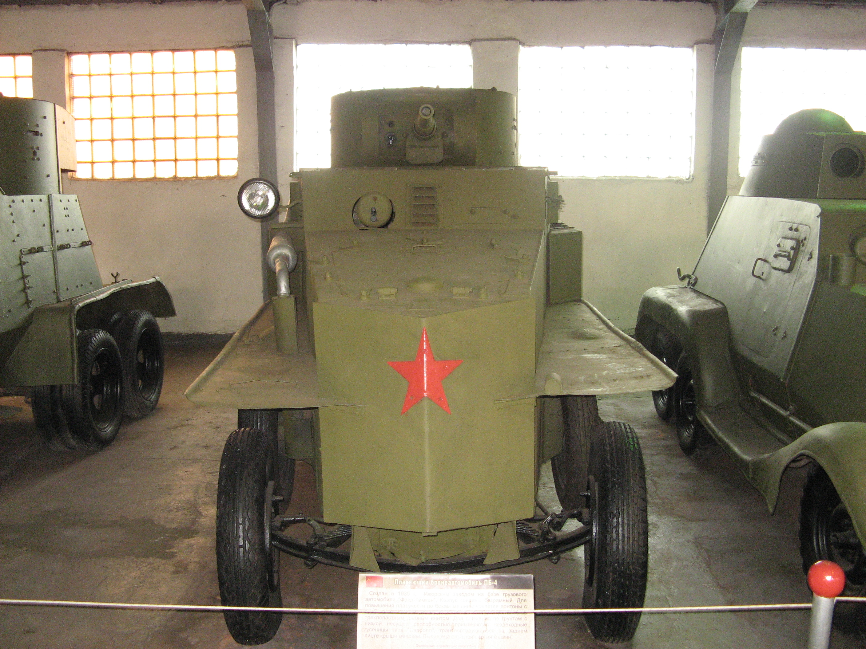 Kubinka tank museum Russia